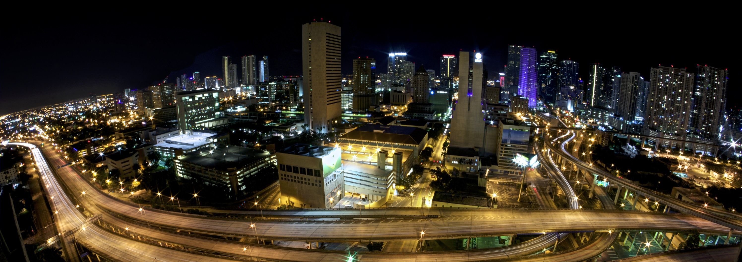 Downtown Miami, Miami, FL, USA